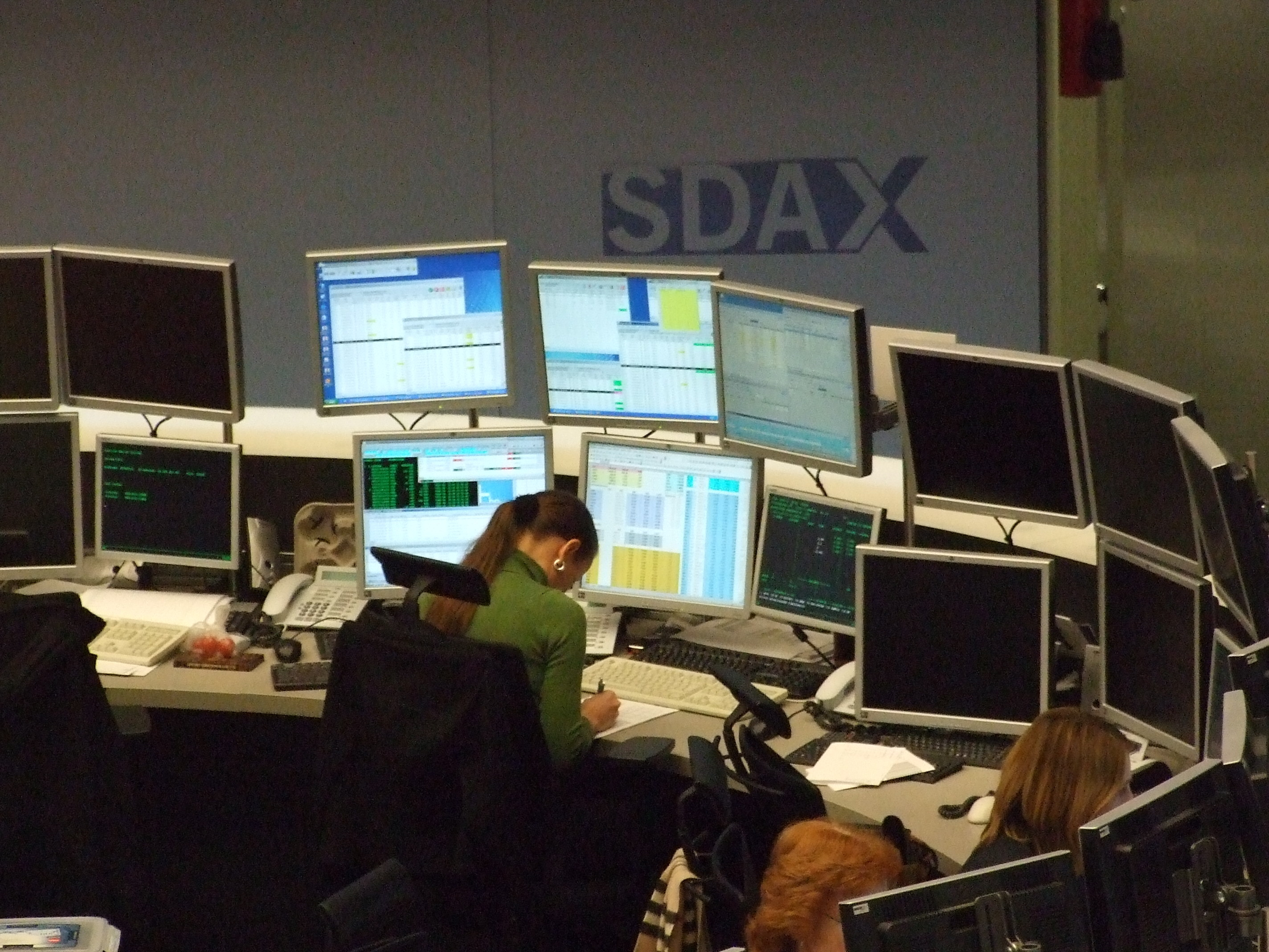 Parkett-Boerse in Ffm